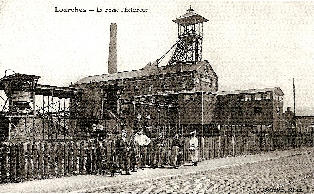 Ancienne fosse Éclaireur à Rœulx aujourd'hui disparue